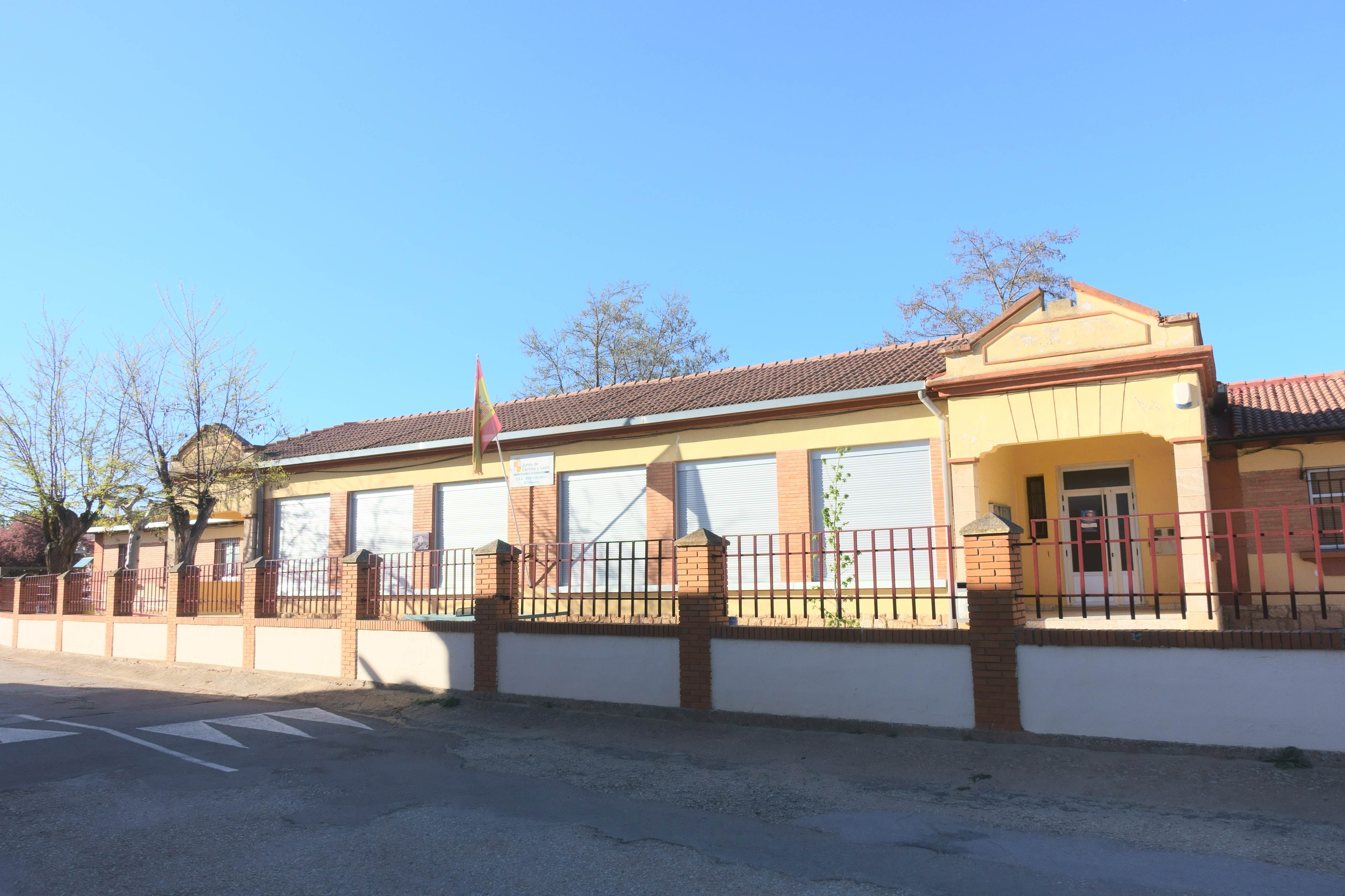 Colegio Rural Agrupado (CRA) Montearlanza, en Villalmanzo (Burgos, España).